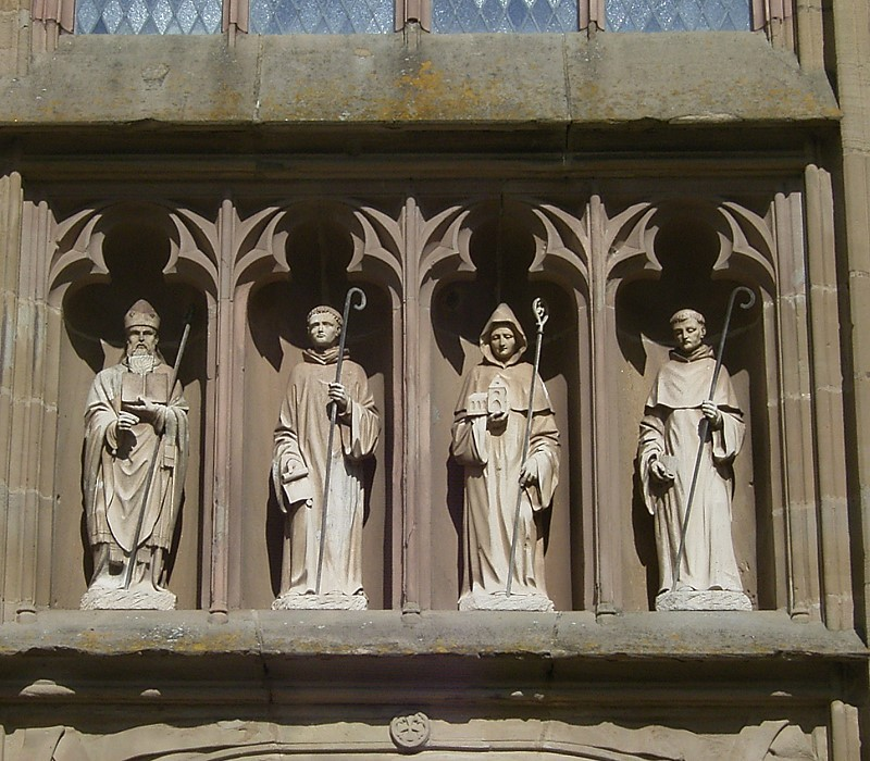 Heimbach, Mariawald abbey